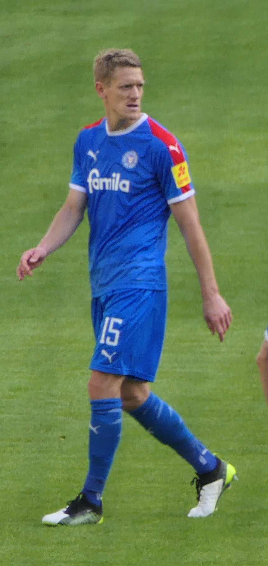 Der Fussballprofi Johannes van den Bergh im Trikot von Holstein Kiel beim Auswärtsspiel gegen den VfB Stuttgart am 20.10.2019.